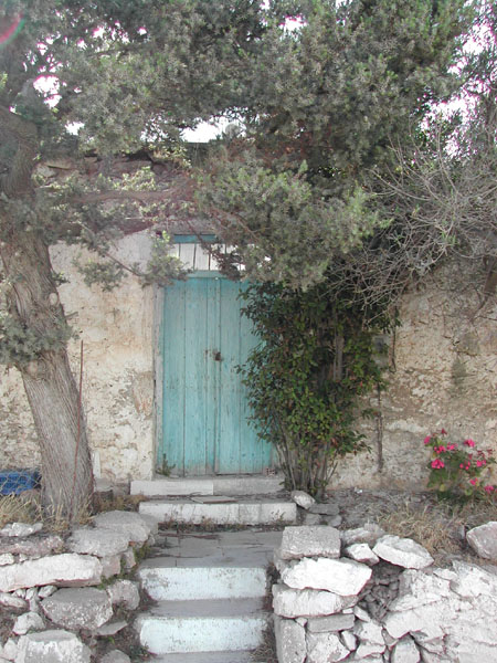 Haus im Gavdos-Viertel.